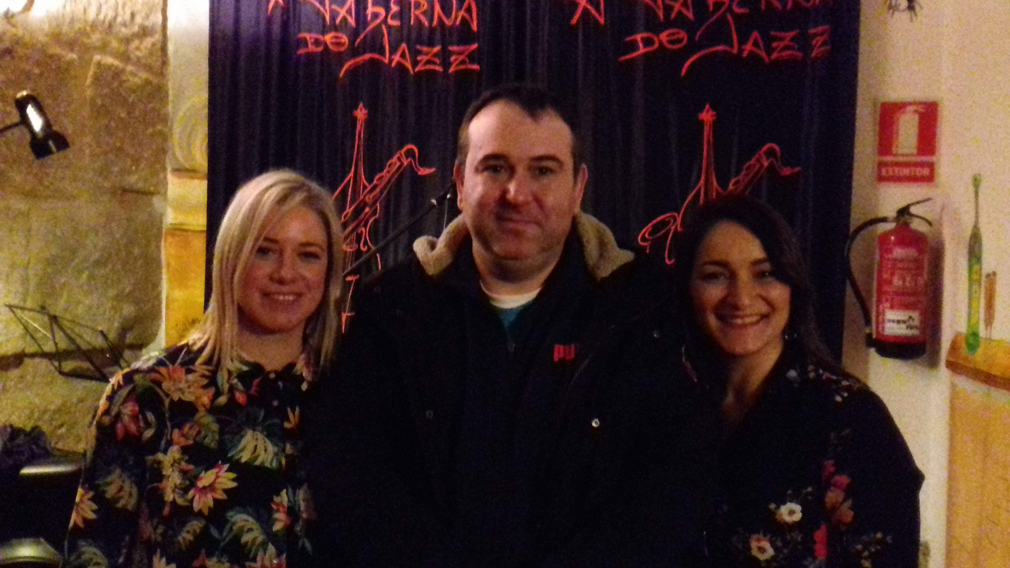 Ruth Oliveira, Alexander Vórtice e Baia Fernández